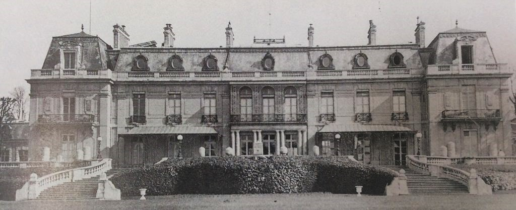 Château Rothschild de Boulogne vers 1920-1930